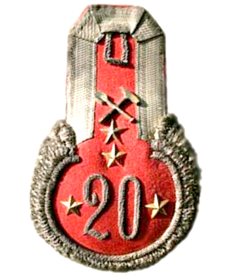 Эполеты штабс-капитана инженерных войск (1827). Армия Российской Империи.